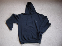 Kapuzensweater